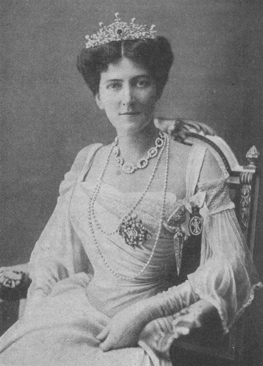 Mary Victoria Leiter (1870-1906)